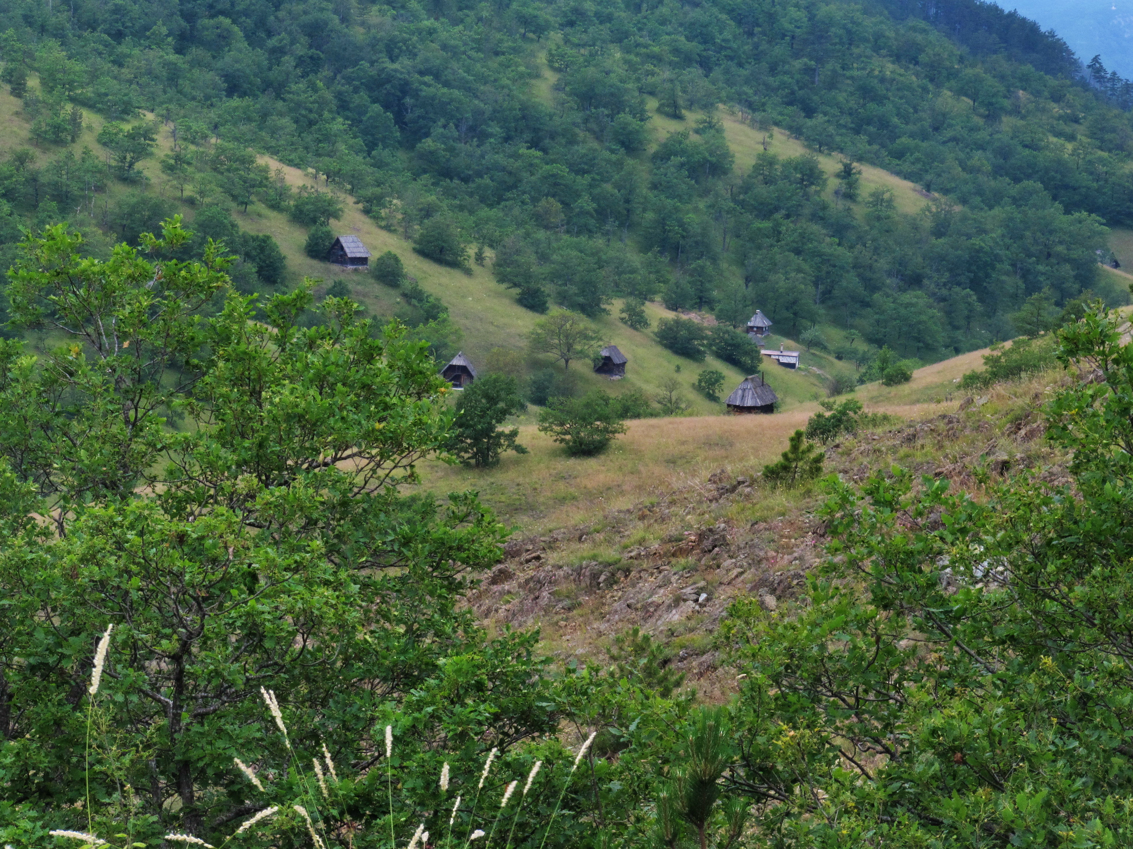 katuni ispod Osojnice ka Mokroj Gori